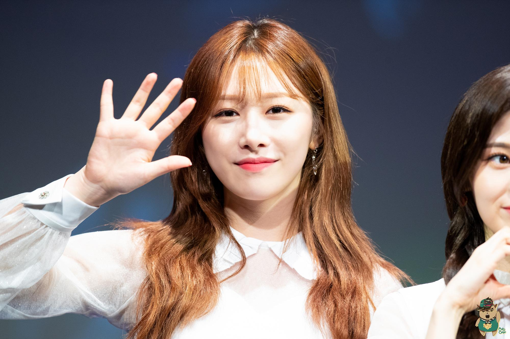 [18.06.09] 구로 팬사인회 직찍 ( 유니티 소나무 의진 )